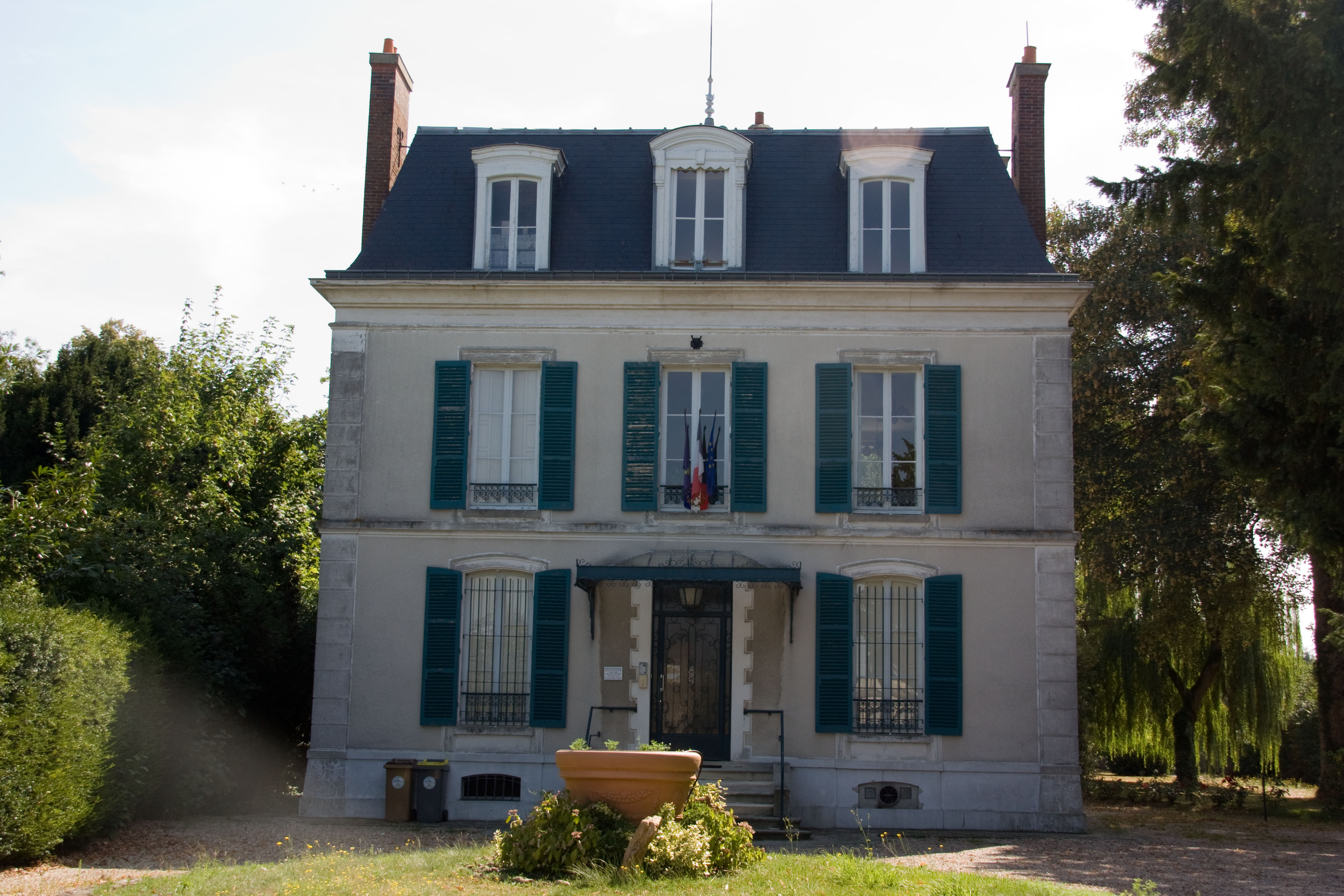 Mairie de Chevannes, Chevannes, Essonne, France